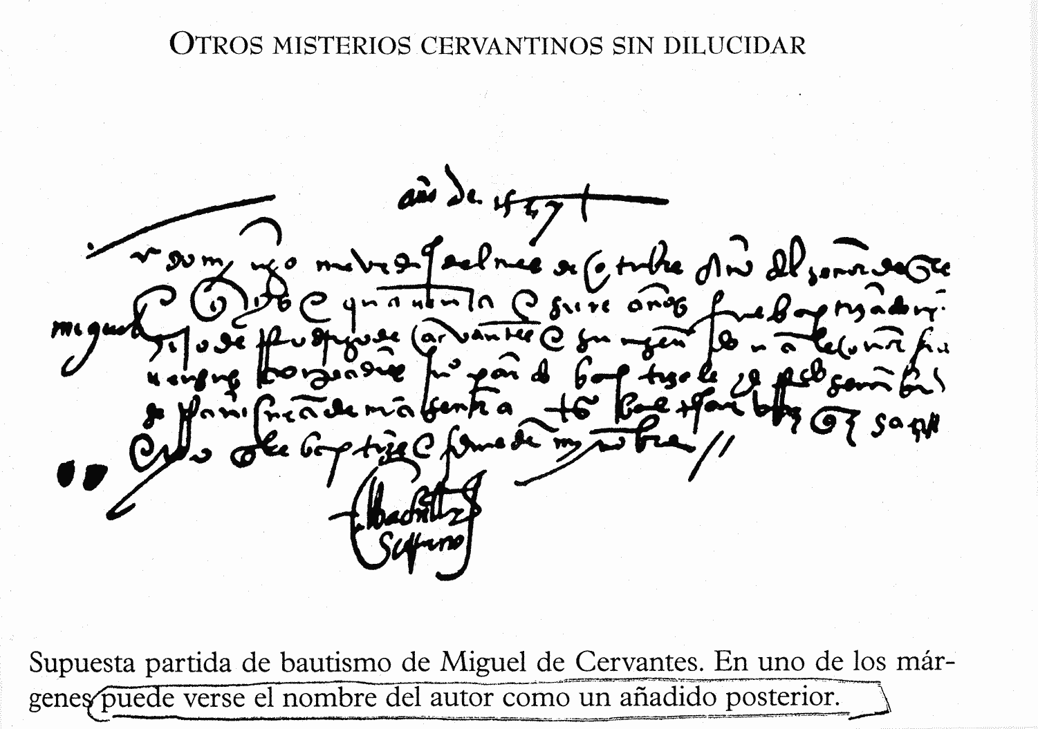 Partida bateig Cervantes